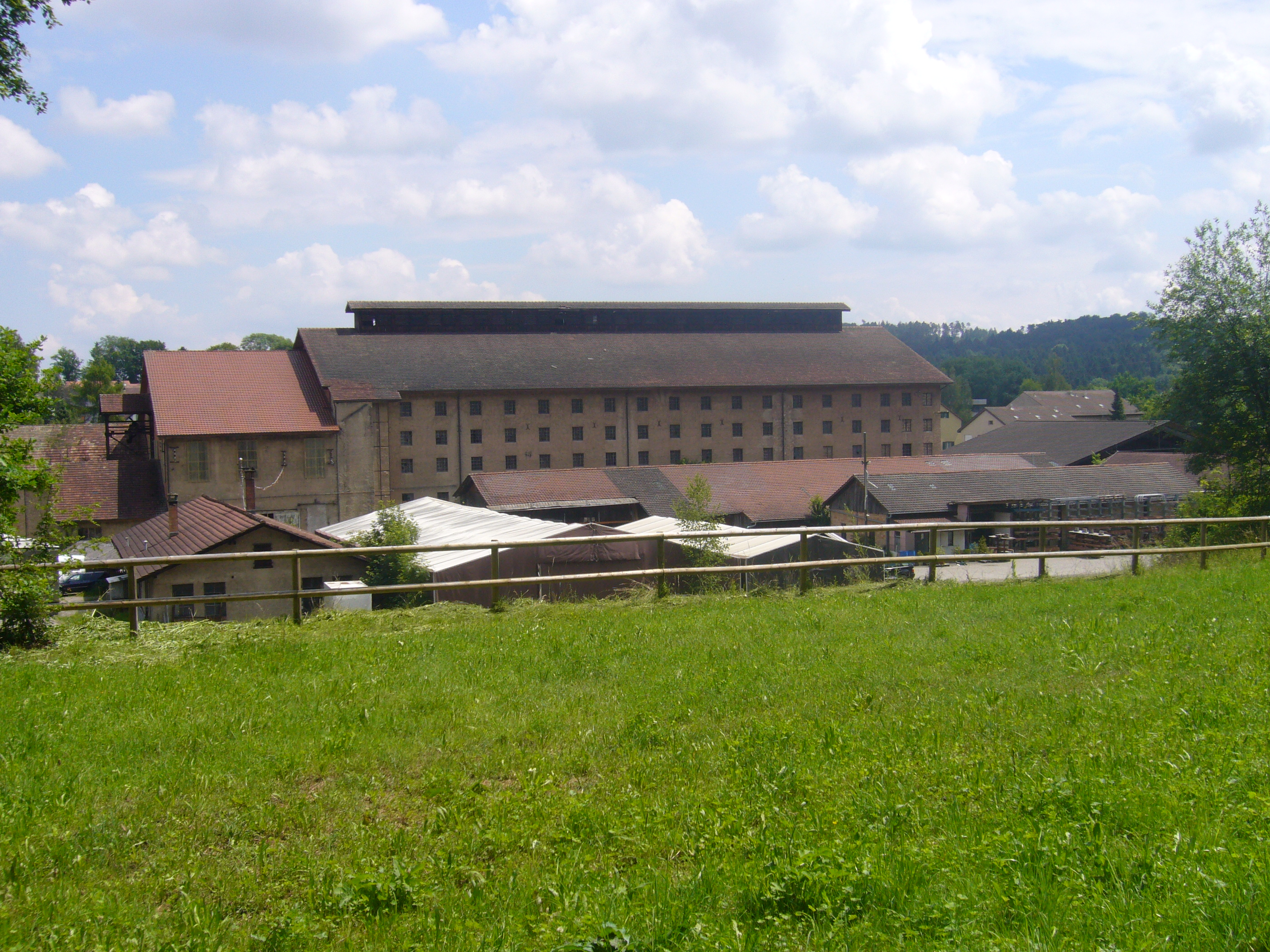 Ziegelei Dättnau (Winterthur-Töss); Hauptgebäude am 8. Juli 2015 von Feuer zerstört